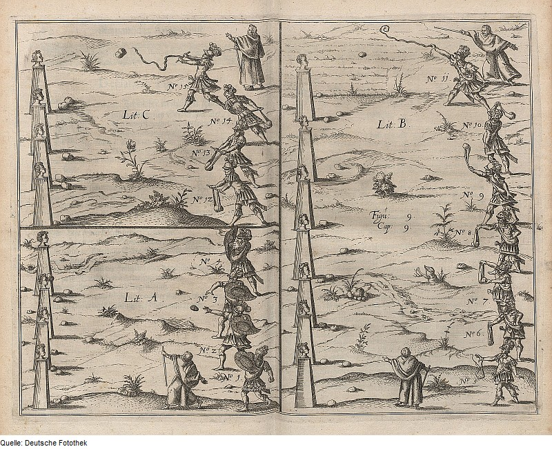 Original image description from the Deutsche Fotothek Kriegskunst & Ausbildung & Stein & Werfen & Schleudern